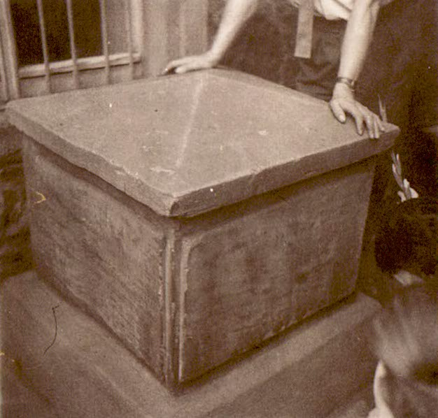 Kamień ustawiony w miejscu śmierci Józefa Poniatowskiego w Lipsku. Zdjęcie z 1957 roku.